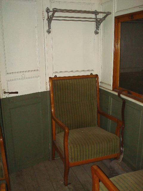 Innenansicht des 2. Klasse Abteils des Régional des Brenets (RdB) BC2 11 aus dem Jahre 1890 im Jahre 2008 bei der Museumsbahn Blonay-Chamby